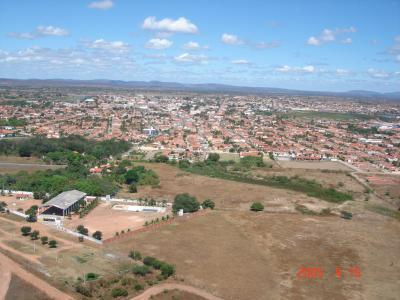 Grande Planície Iguatuense